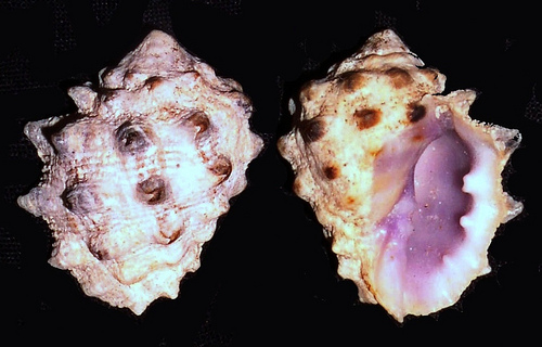 Drupa (Drupa) morum Röding, 1798